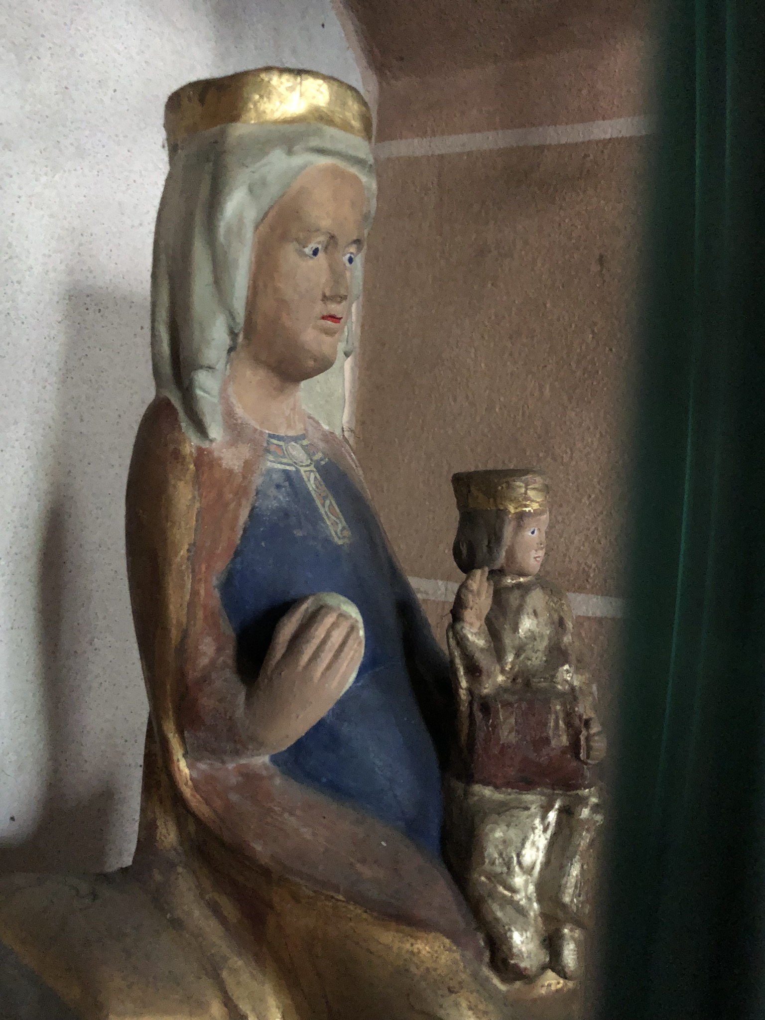 Sitzmadonna in Medebach 13. Jahrhundert Deutschland NRW